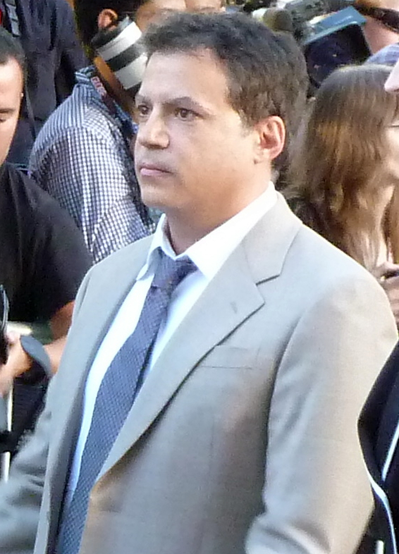 Movie producer Michael De Luca.